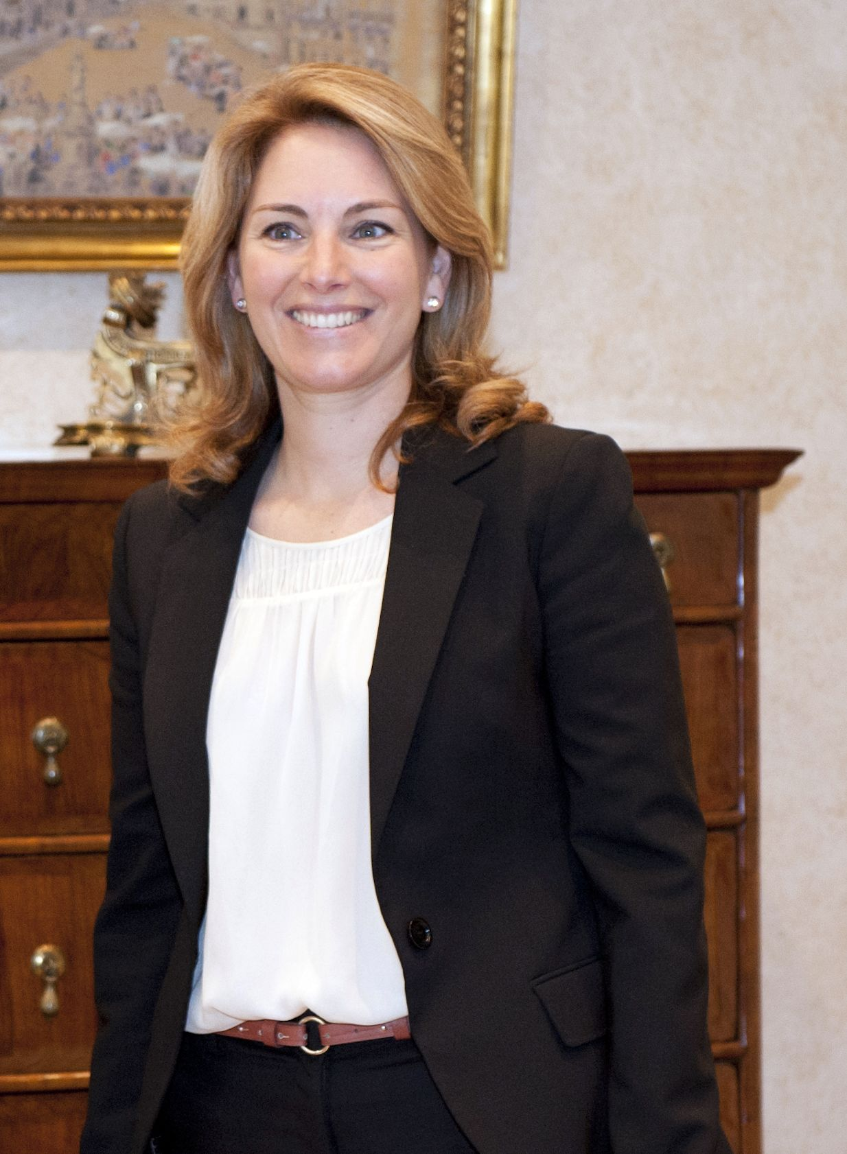 Arantza Quiroga en 2013